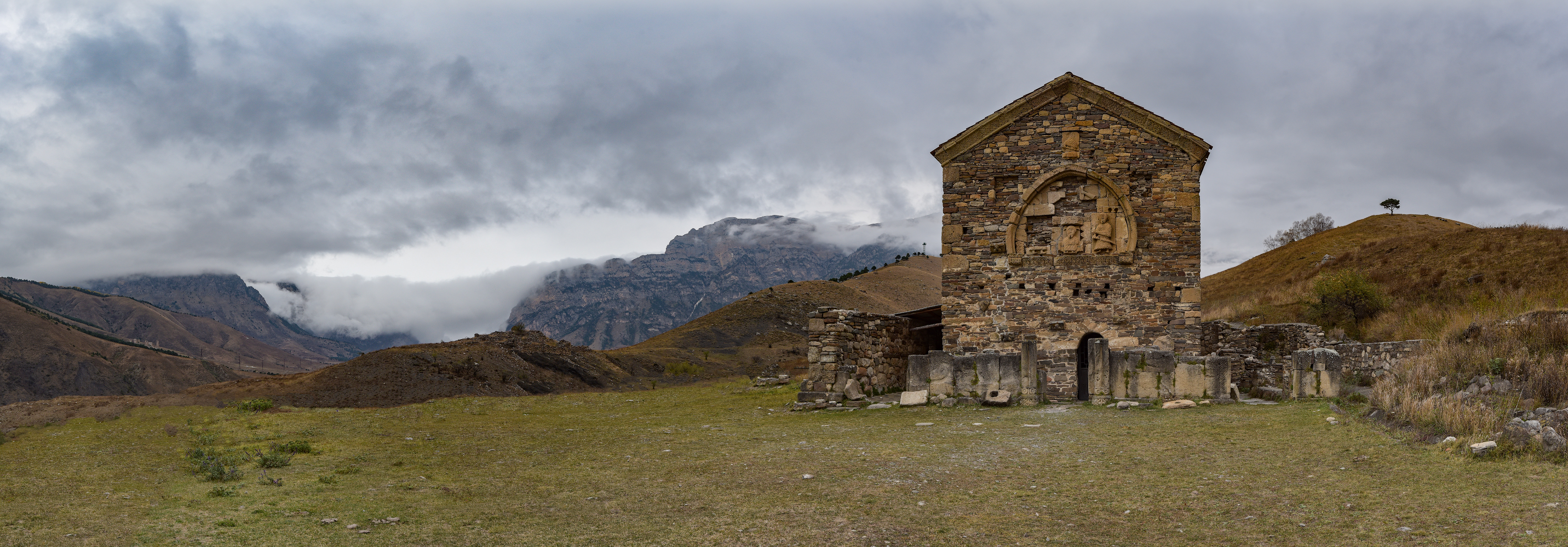 Храм Тхаба - Ерды. Горная Ингушетия. Temple Thaba - Erds. Mountainous Ingushetia.